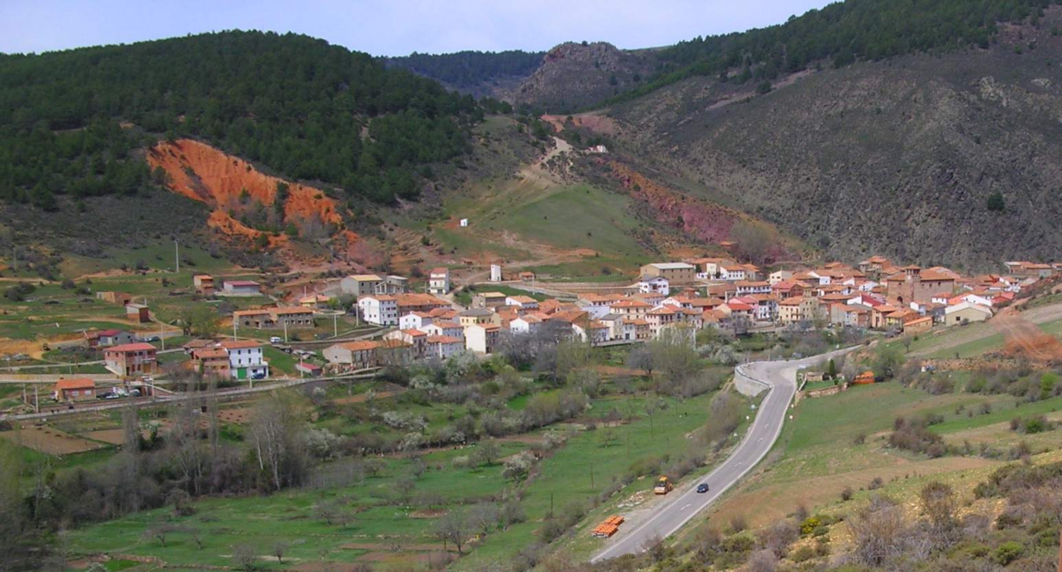 Vista general de Noguera de Albarracín (Teruel). Imagen de dominio público Autor: Alberto Ferreras Remesal